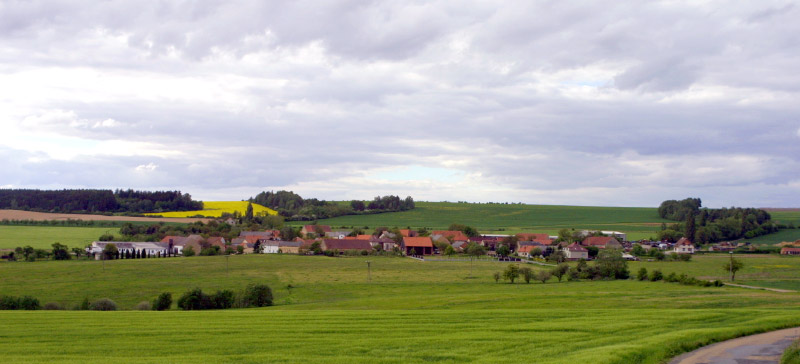 Holovousy od jihovýchodu.